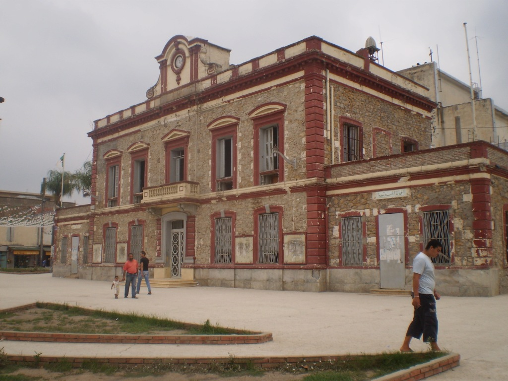 Mairie de Boufarik en Algérie.